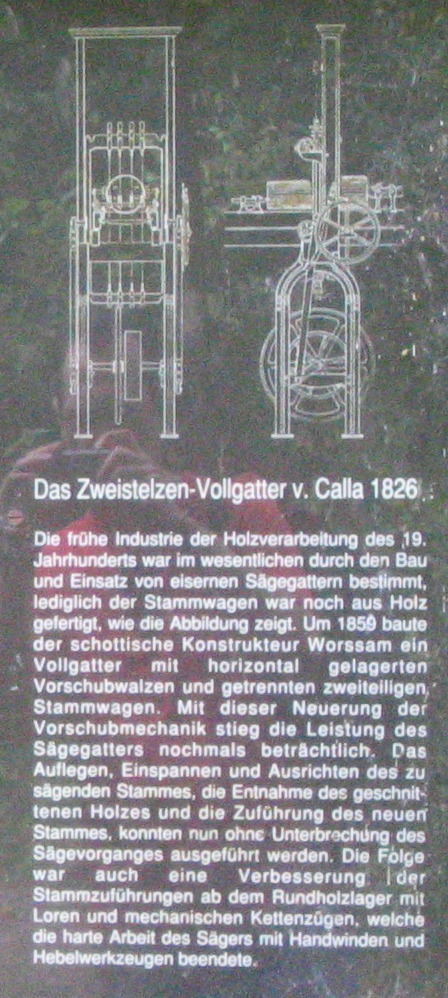 Permanet angebrachte Informationstafel beim Hofgut Sternen über die Entwicklung der Sägemaschinen im Schwarzwald